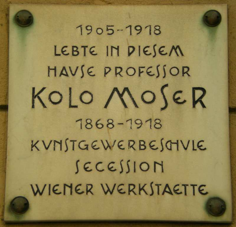 Gedenktafel für den Künstler Koloman (Kolo) Moser am Haus Landstraßer Hauptstraße 138 in Wien-Landstraße